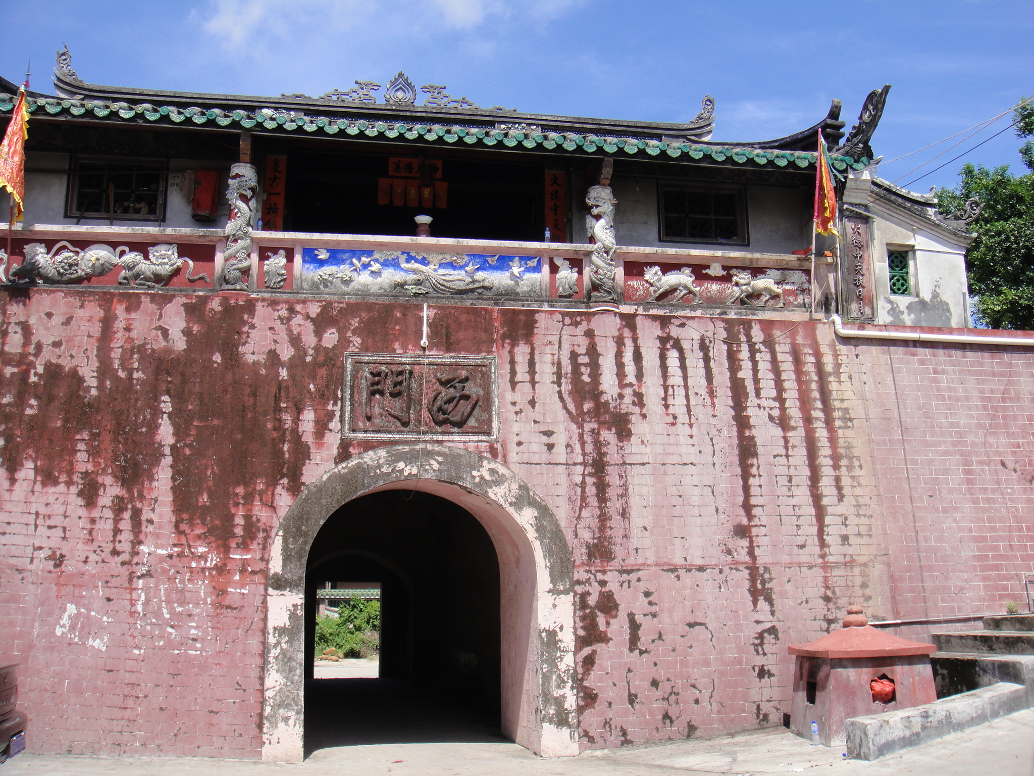 中文（中国大陆）: 惠东平海古城